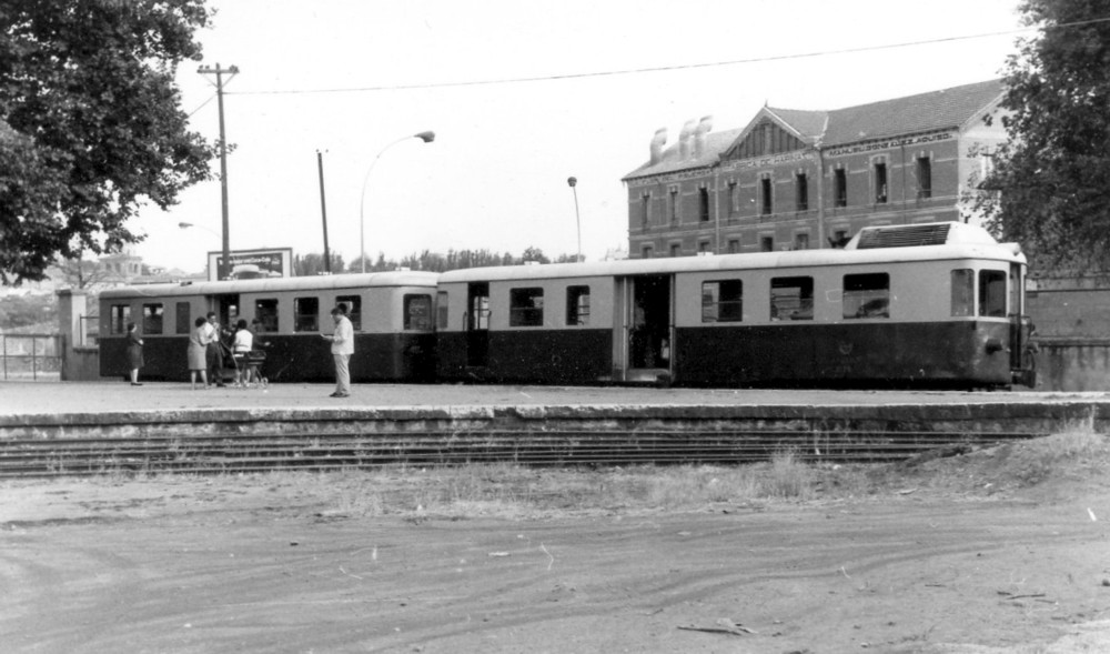 Billard Triebwagen Baureihe A 150 D7 mit dazugehörendem Personenwagen Baureihe R 150 D im Bahnhof Valladolid der Compañía de Ferrocarriles de Castilla (FSC)